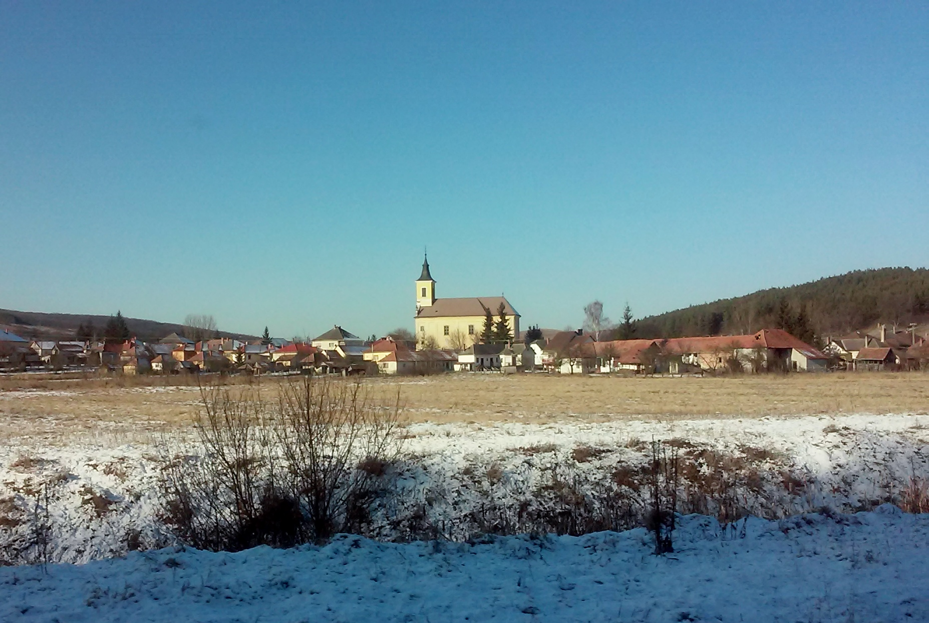 Bátor